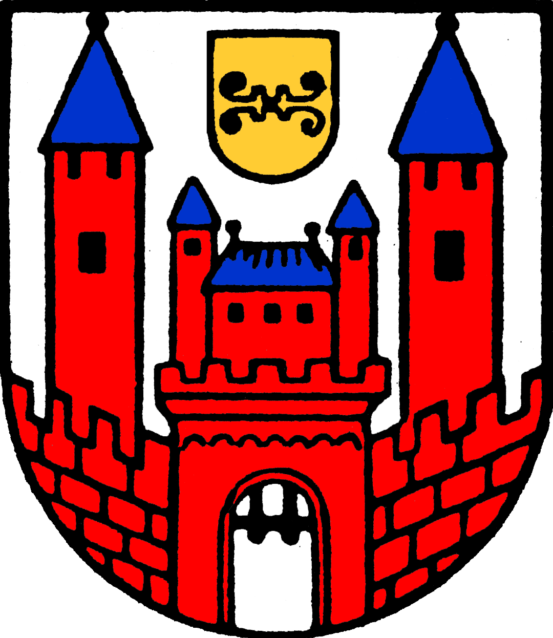 Wappen der Stadt Hatzfeld (Eder) – Zeitgleich mit der Verleihung des Rechts zur Führung der Bezeichnung „Stadt“ wurde im November 1950 der Gemeinde Hatzfeld durch das Hessische Staatsministerium das Recht zur Führung eines Wappens nach dem vorgelegten Entwurf verliehen. Allem Anschein nach muss es sich dabei um dieses Wappen gehandelt haben.